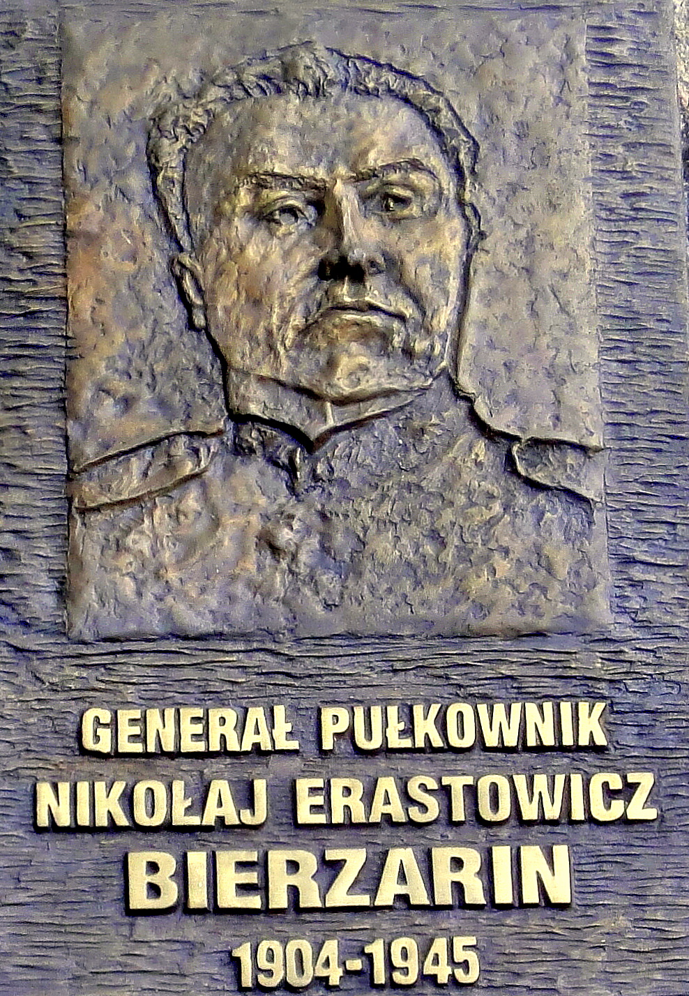 Gorzów Wlkp., park Siemiradzkiego. Pamiątkowa tablica N.E. Bierzarina, dowódcy 5 Armii Uderzeniowej, która 30.01.1945 r. zajęła niemiecki Landsberg (dziś Gorzów). Tablica została usunięta w sierpniu 2017 r. w myśl ustawy dekomunizacyjnej z 2 września 2016 roku